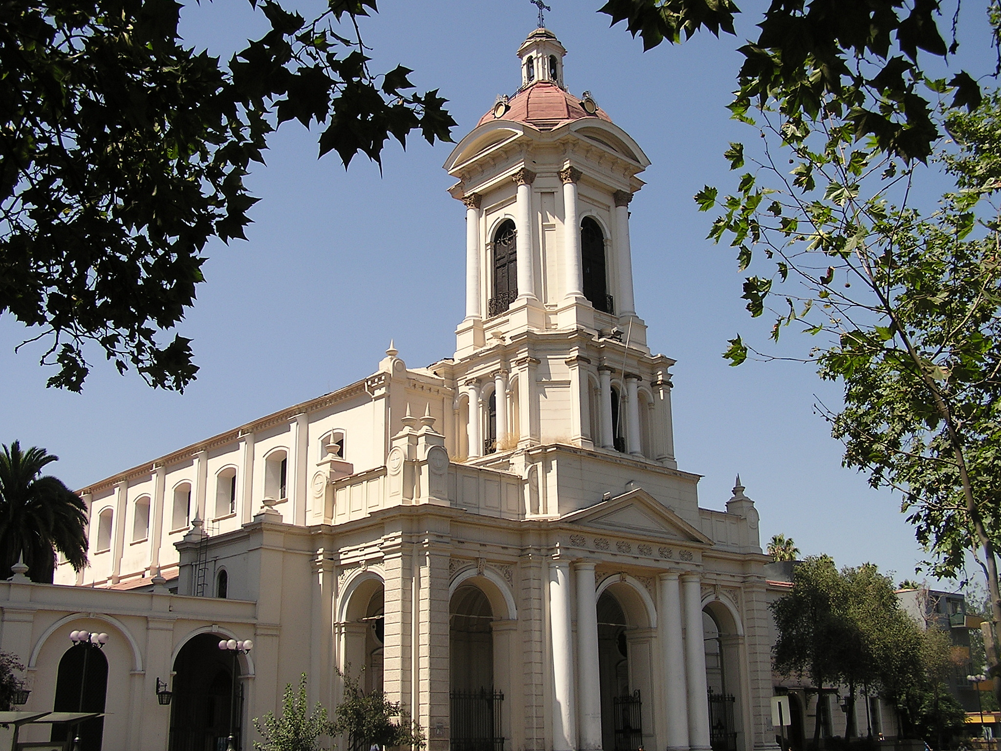 Vista de la Iglesia de Nuestra Señora de La Divina Providencia This is a photo of a national monument in Chile: 827